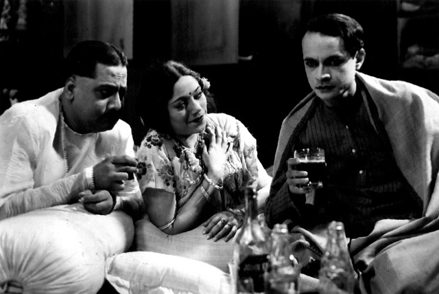 P.C. Barua, Amar Mullick et Chandrabati dans la version bengali de Devdas